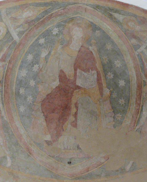 Kristus v mandorle - románská freska